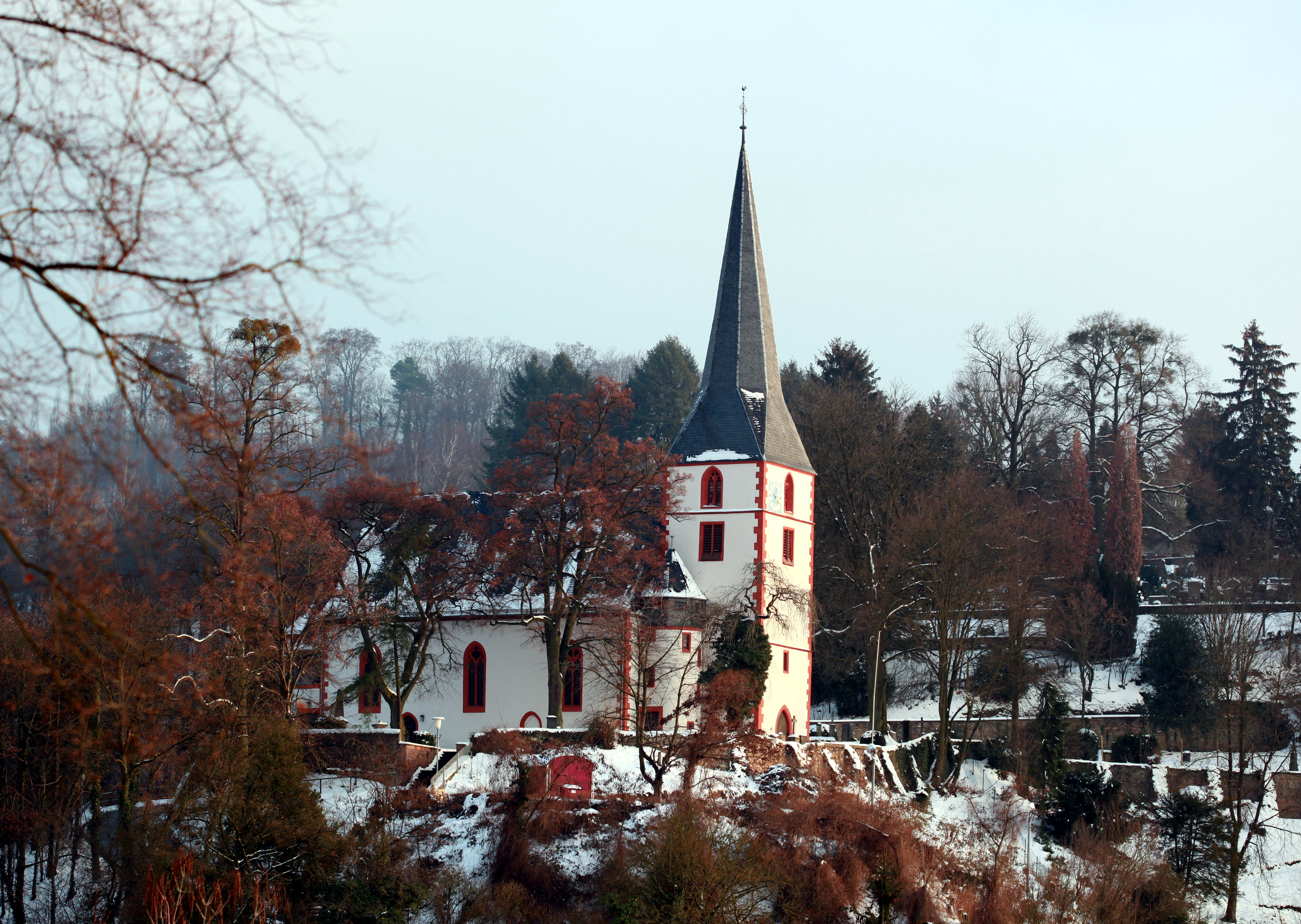 Die Bergkirche von Bensheim-Auerbach (Hessen)